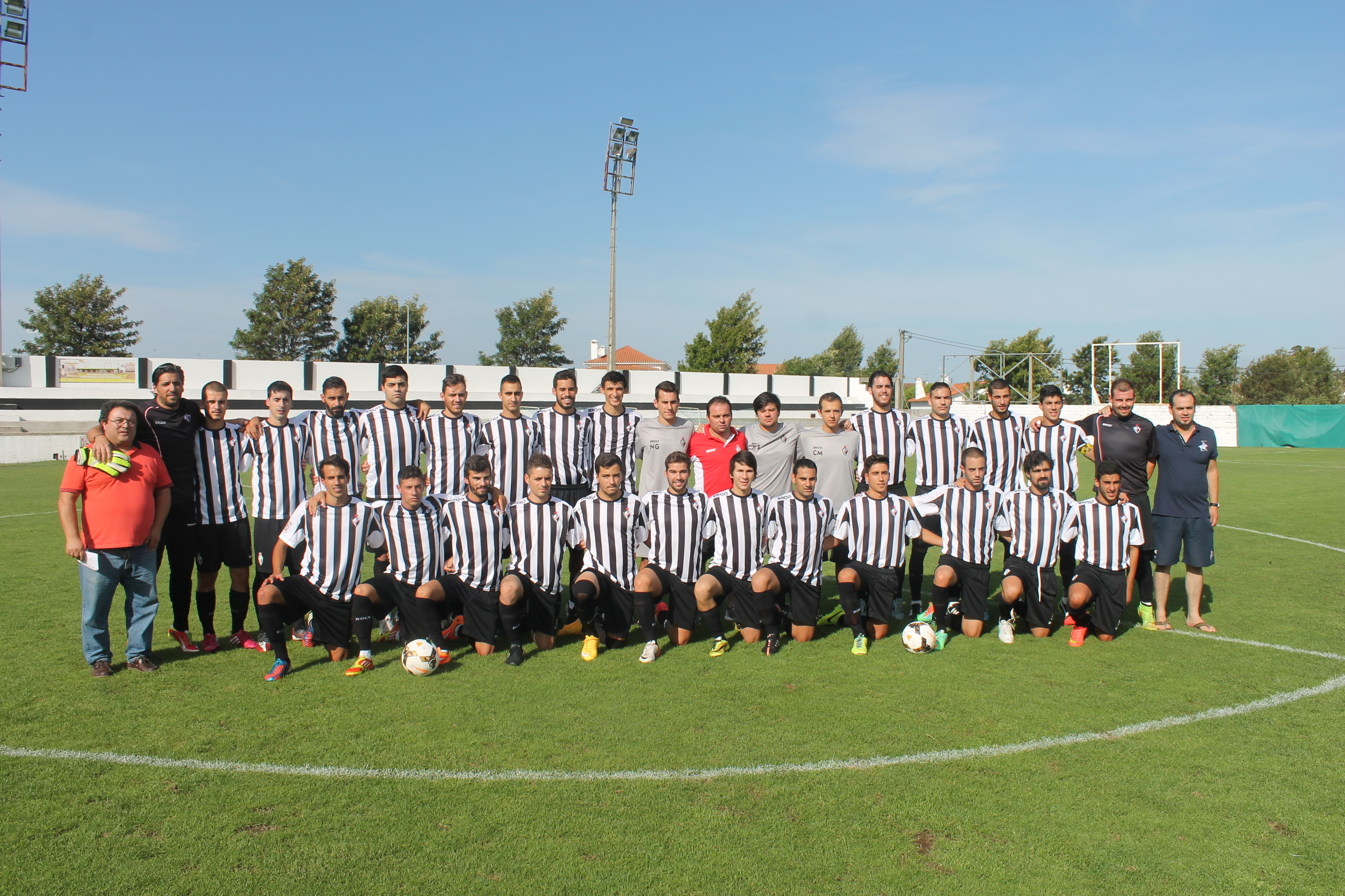 plantel